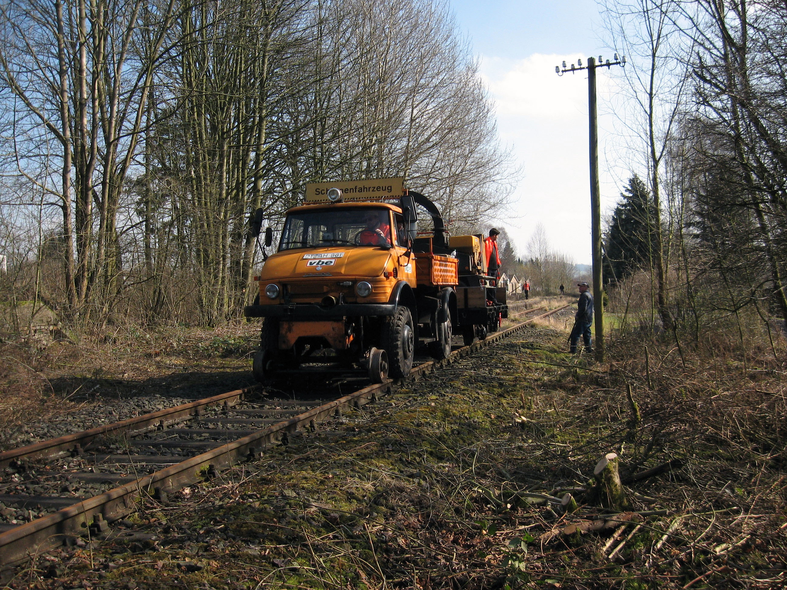 LEL beim Freischneiden der Begatalbahn am Hp-Farmbeck im März 2008